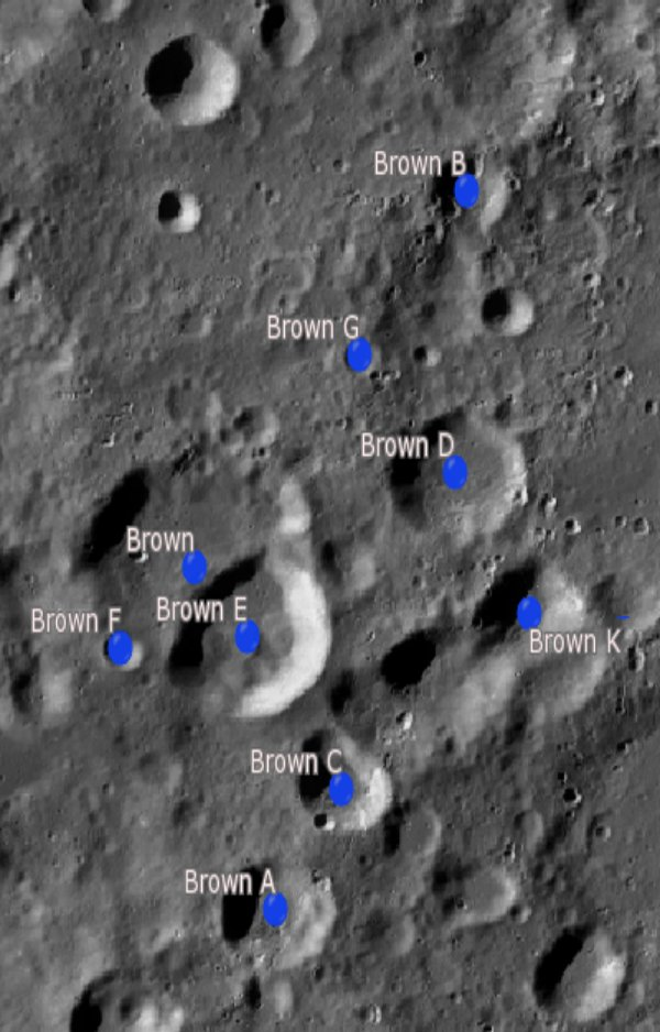 Cráter lunar Brown. Cráteres satélite. (Imagen LRO)